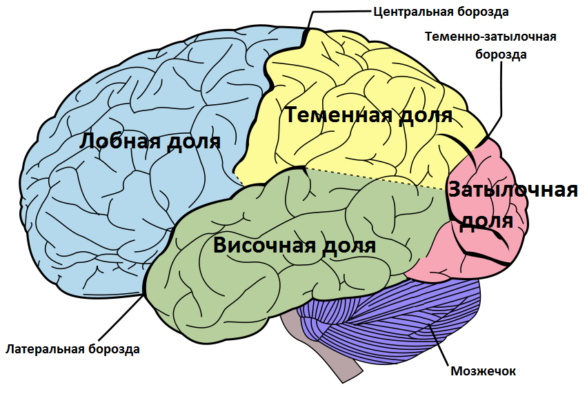 Мною добавлены подписи.